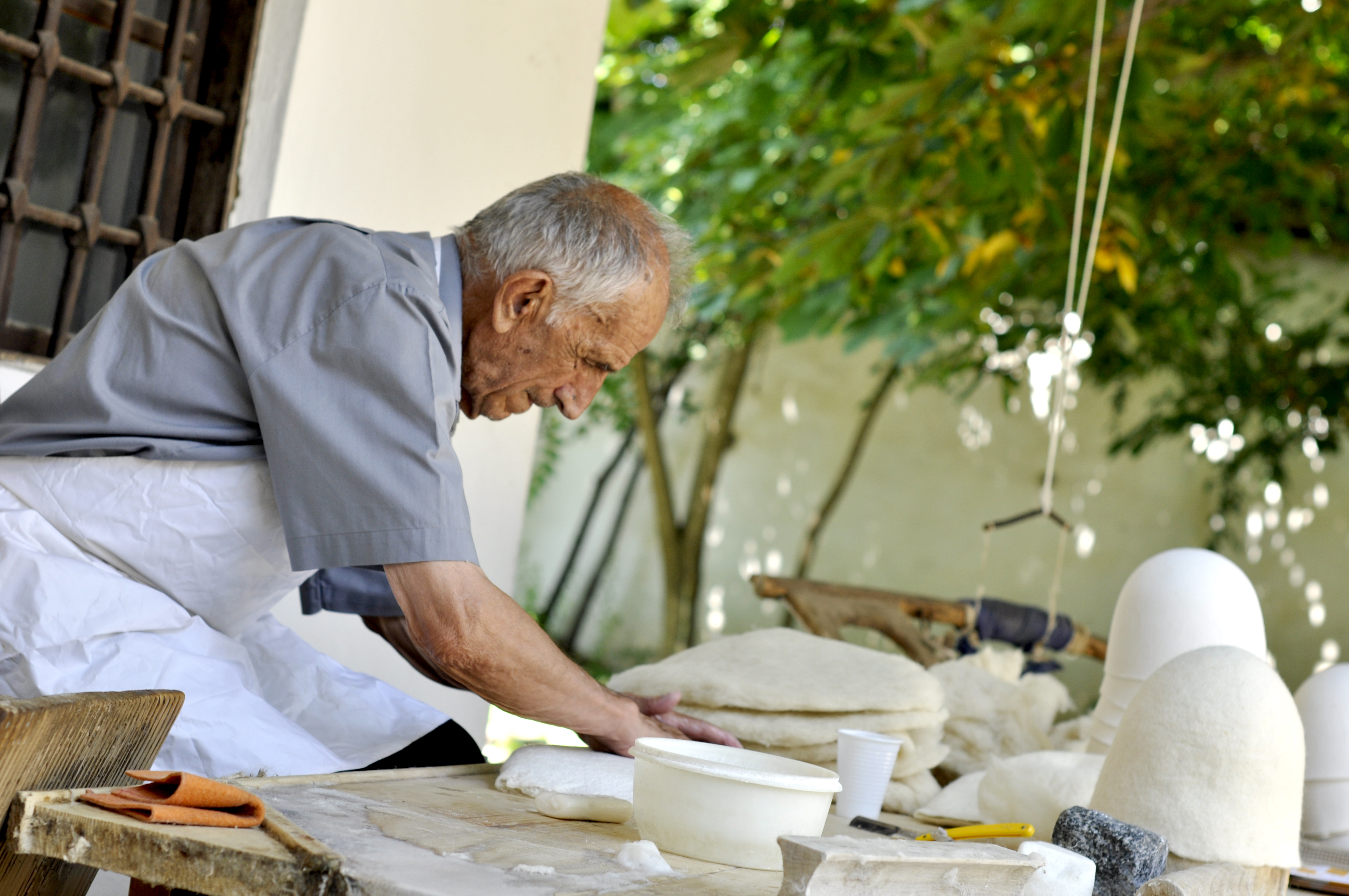 mjeshtri i plisave